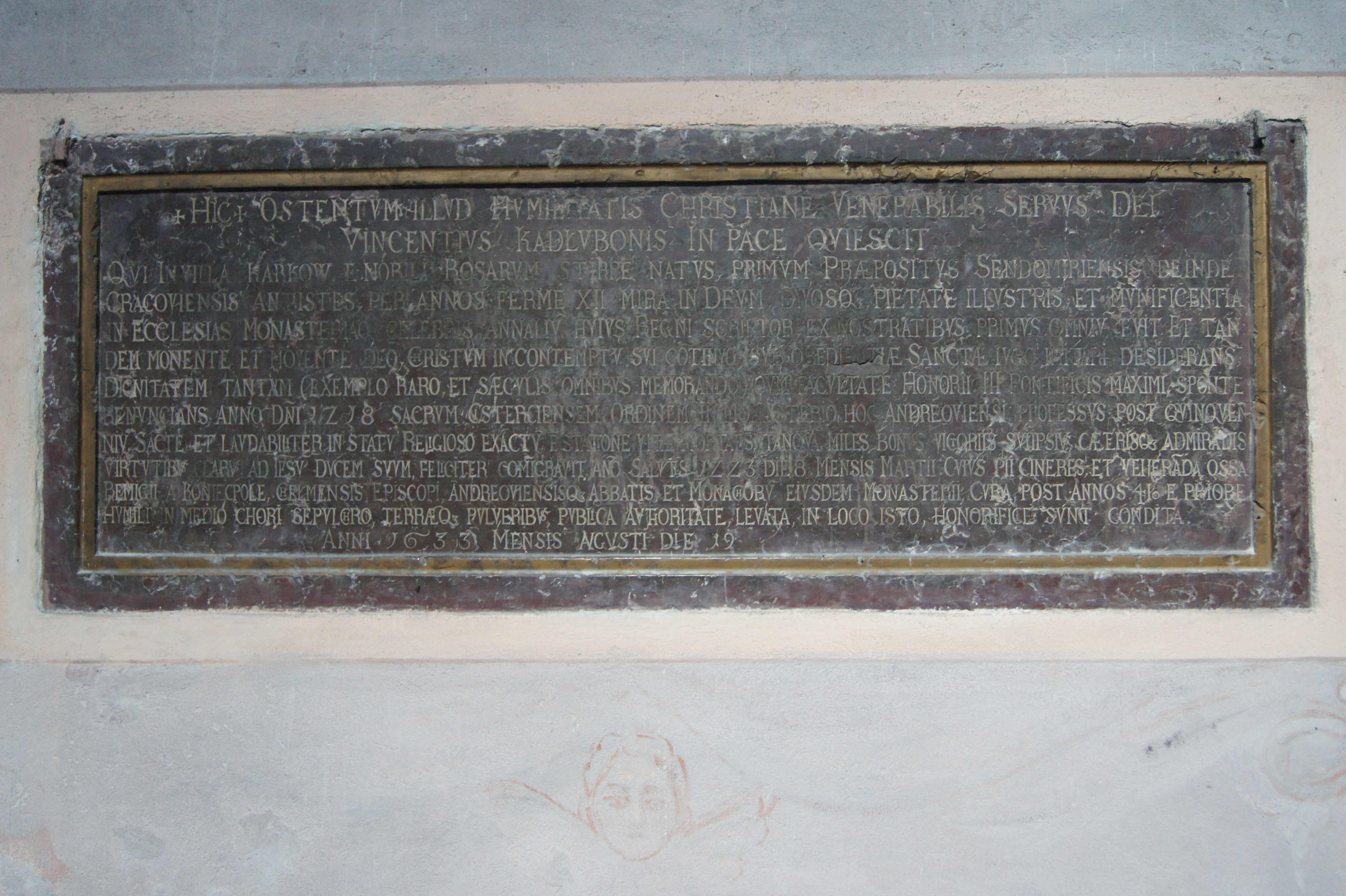 Jędrzejów Abbey Native nameArchiopactwo Cystersów w JędrzejowieLocationJędrzejówCoordinates50° 39′ 12.85″ N, 20° 17′ 04.02″ E Established1140Authority control : Q1775407 VIAF: 149797650 LCCN: n2011021173 GND: 5267880-5 WorldCat institution QS:P195,Q1775407 Epitafium Wincentego Kadłubka z 1633 roku w kościele klasztornym